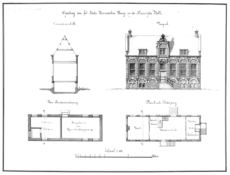 Tekening (1873) "Opmeting van het Stads Korenmeters Huisje op de Nieuwezijds Kolk"